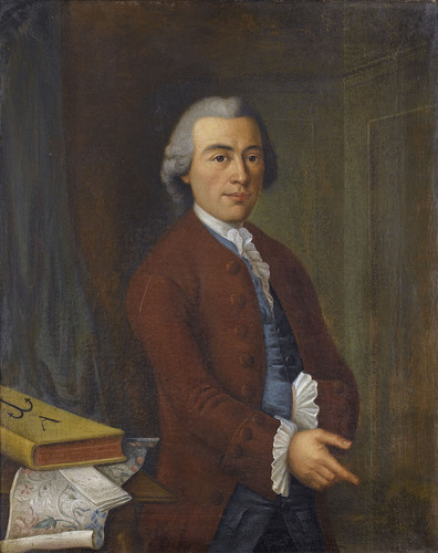 Porträt eines Tapezierers.